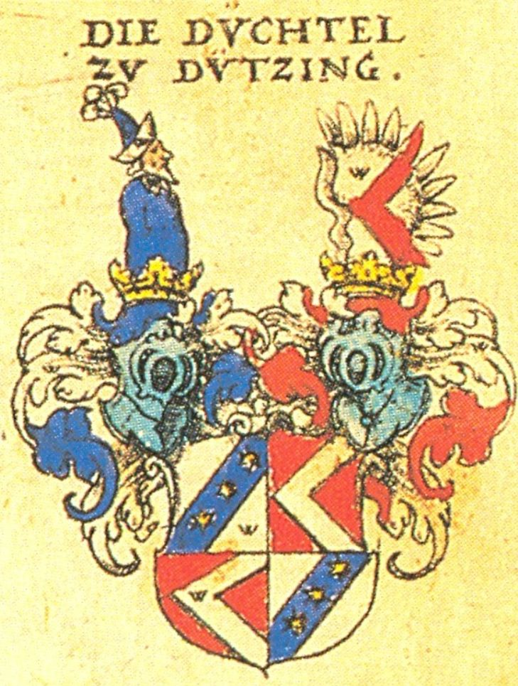 Wappen des Bayerischen Adelsgeschlechts Düchtel zu Dützing (Tutzing)